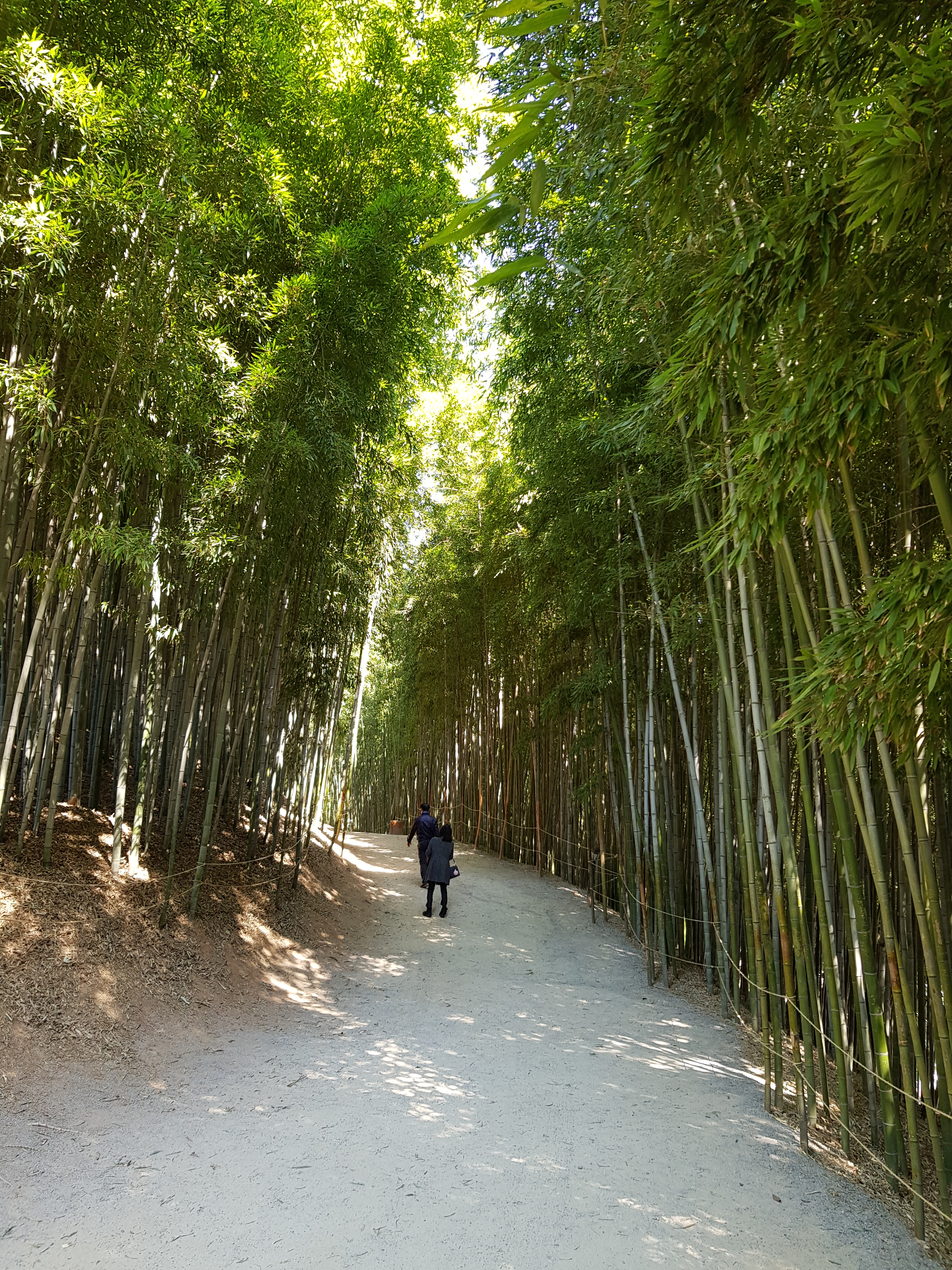 Der Bambuswald Jungnogwon in Damyang (Südkorea).